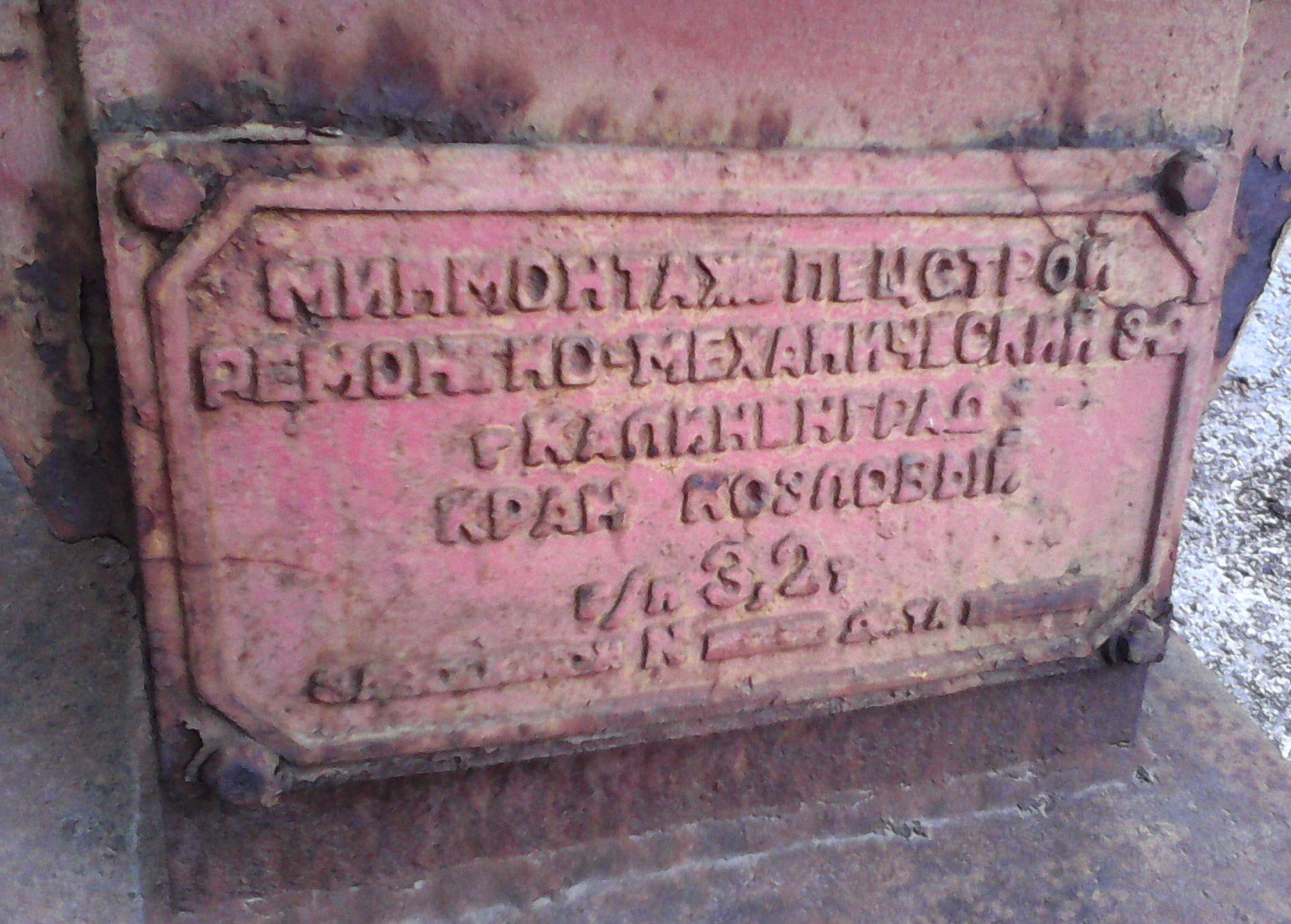 Минмонтажспецстрой